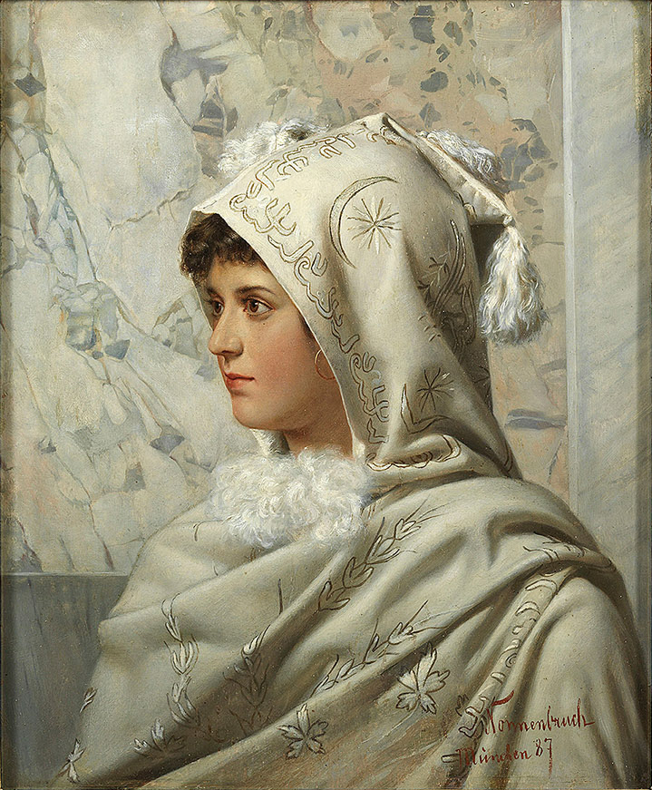 Profilbildnis eines Mädchens in weißem Mantel Öl auf Holz, 40,8 cm x 33 cm